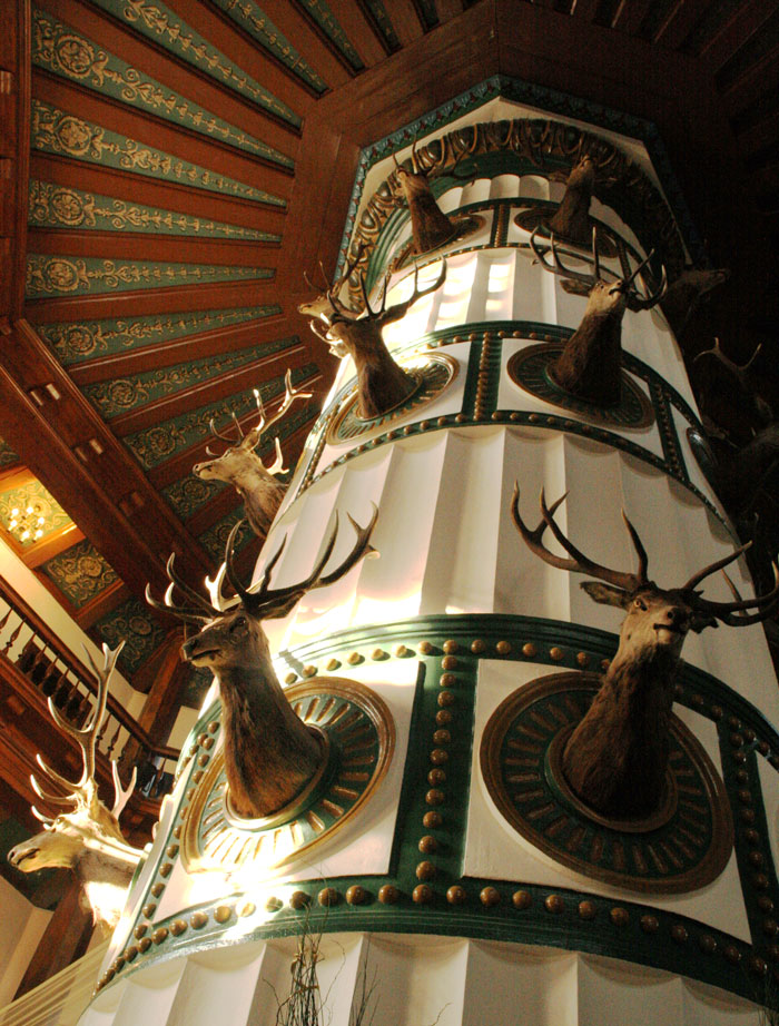 Pałac w Antoninie